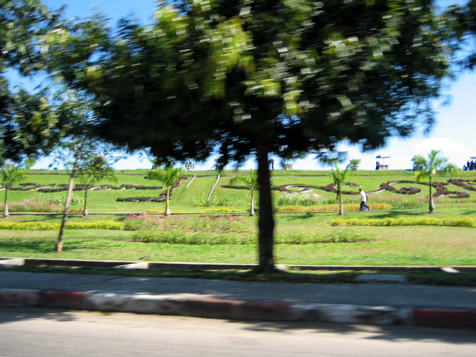 Inya Lake park grounds, Yangon, Myanmar